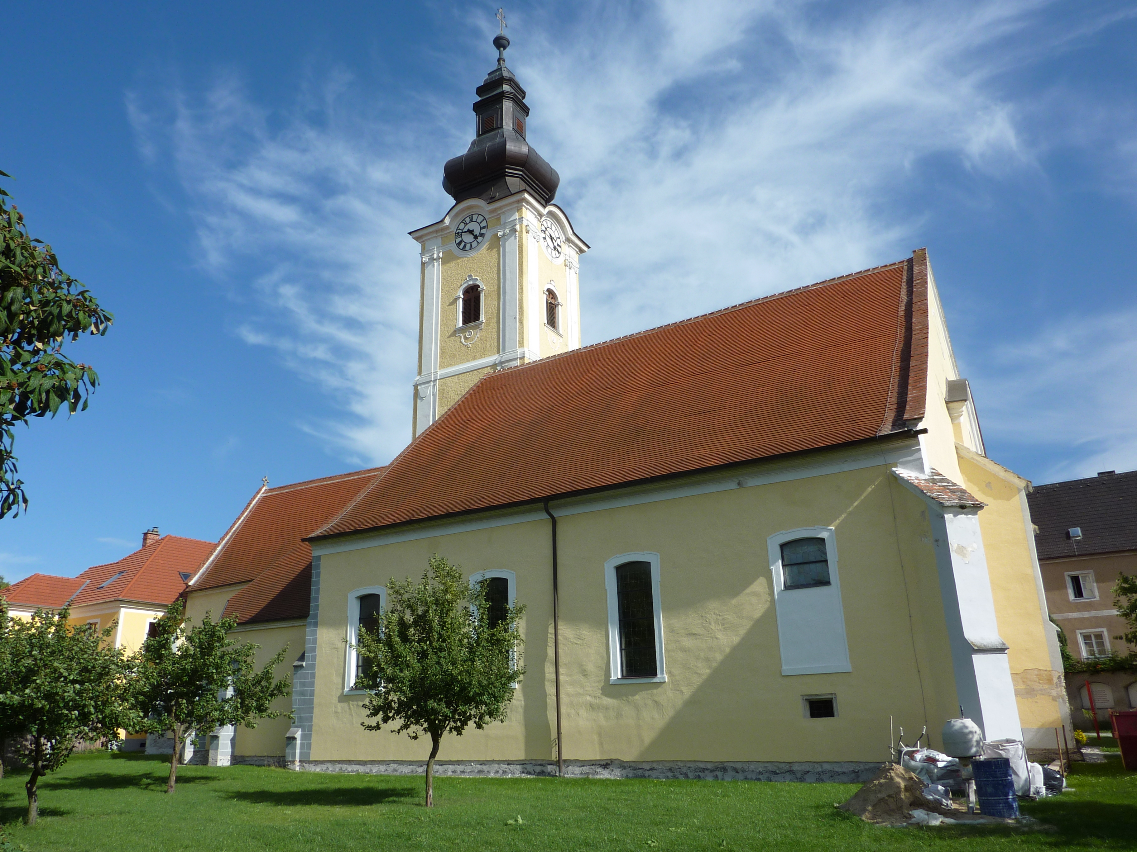 Pfarrkirche in Mautern an der Donau in Niederösterreich